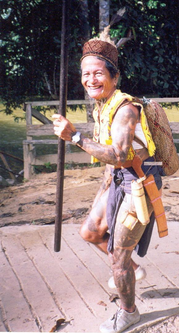 ШаманШаман с острова Борнео